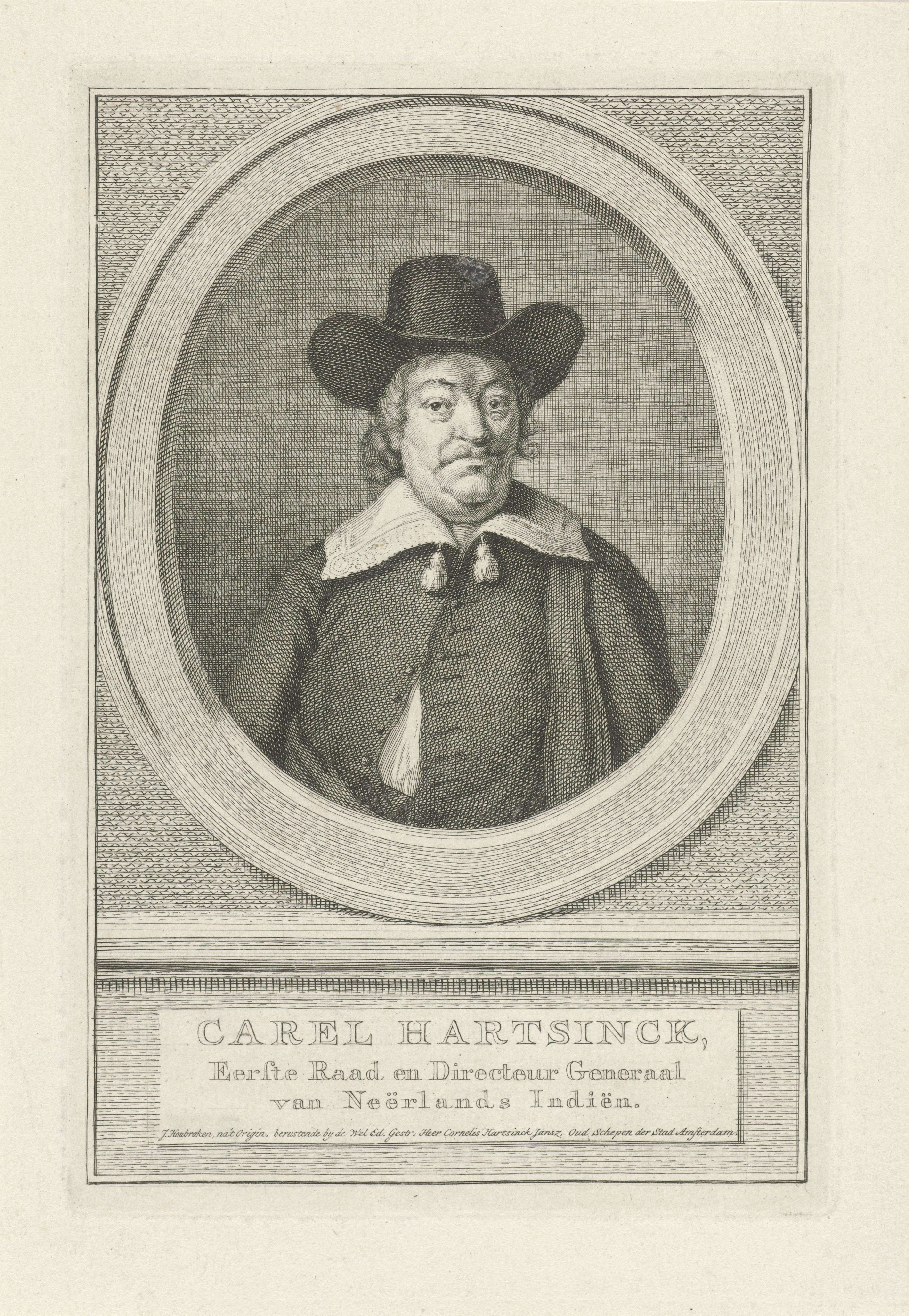 IdentificatieTitel(s): Portret van Willem Carel HartsinckObjecttype: prent Objectnummer: RP-P-OB-48.593Catalogusreferentie: Ver Huell 182-2(2)Opmerking: RP-P-1894-A-18470 is eerste staat.FMP 2176-aOpschriften / Merken: verzamelaarsmerk, verso, gestempeld: Lugt 2165Omschrijving: Portret van Carel Hartsinck, directeur van Nederlands Indië, in een ovaal. Het portret rust op een plint met daarop zijn naam en gegevens in drie regels in het Nederlands.VervaardigingVervaardiger: prentmaker: Jacob Houbraken (vermeld op object)Plaats vervaardiging: AmsterdamDatering: 1749 - 1780 en/of 1796Materiaal: papier Techniek: graveren (drukprocedé)Afmetingen: plaatrand: h 180 mm × b 120 mmToelichtingDeze prent is oorspronkelijk bedoeld als aanvulling op Jan Wagenaars ‘Vaderlandsche historie’* en was zo vanaf 1796 verkrijgbaar bij Johannes Allart te Amsterdam. Voor de advertentie Waar: in Allart de 60 portretten en 7 platen, allen gegraveerd door Houbraken, ter aanvulling op Wagenaars ‘Vaderlandsche historie’ aanbiedt, zie RP-P-OB-77.766. *Van dit werk zijn in de achttiende eeuw meerdere uitgaves verschenen, zoals: Wagenaar, Jan. Vaderlandsche historie, vervattende de geschiedenissen der Vereenigde Nederlanden (…). 21 delen. Amsterdam: Isaak Tirion, 1749-1759. Wagenaar, Jan. Vaderlandsche historie, vervattende de geschiedenissen der nu Vereenigde Nederlanden (…). 21 delen. Amsterdam: weduwe Isaak Tirion, 1770. Wagenaar, Jan. Vaderlandsche historie, vervattende de geschiedenissen der nu Vereenigde Nederlanden (…). 21 delen. Amsterdam, Leiden, Dordrecht en Harlingen: P. Schouten e.a., 1782. Wagenaar, Jan. Vaderlandsche historie, vervattende de geschiedenissen der nu Vereenigde Nederlanden (…). 21 delen. Amsterdam: Johannes Allart, 1790-1796.OnderwerpWat: historical personsWie: Willem Carel HartsinckVerwerving en rechtenVerwerving: onbekend 2006Copyright: Publiek domein